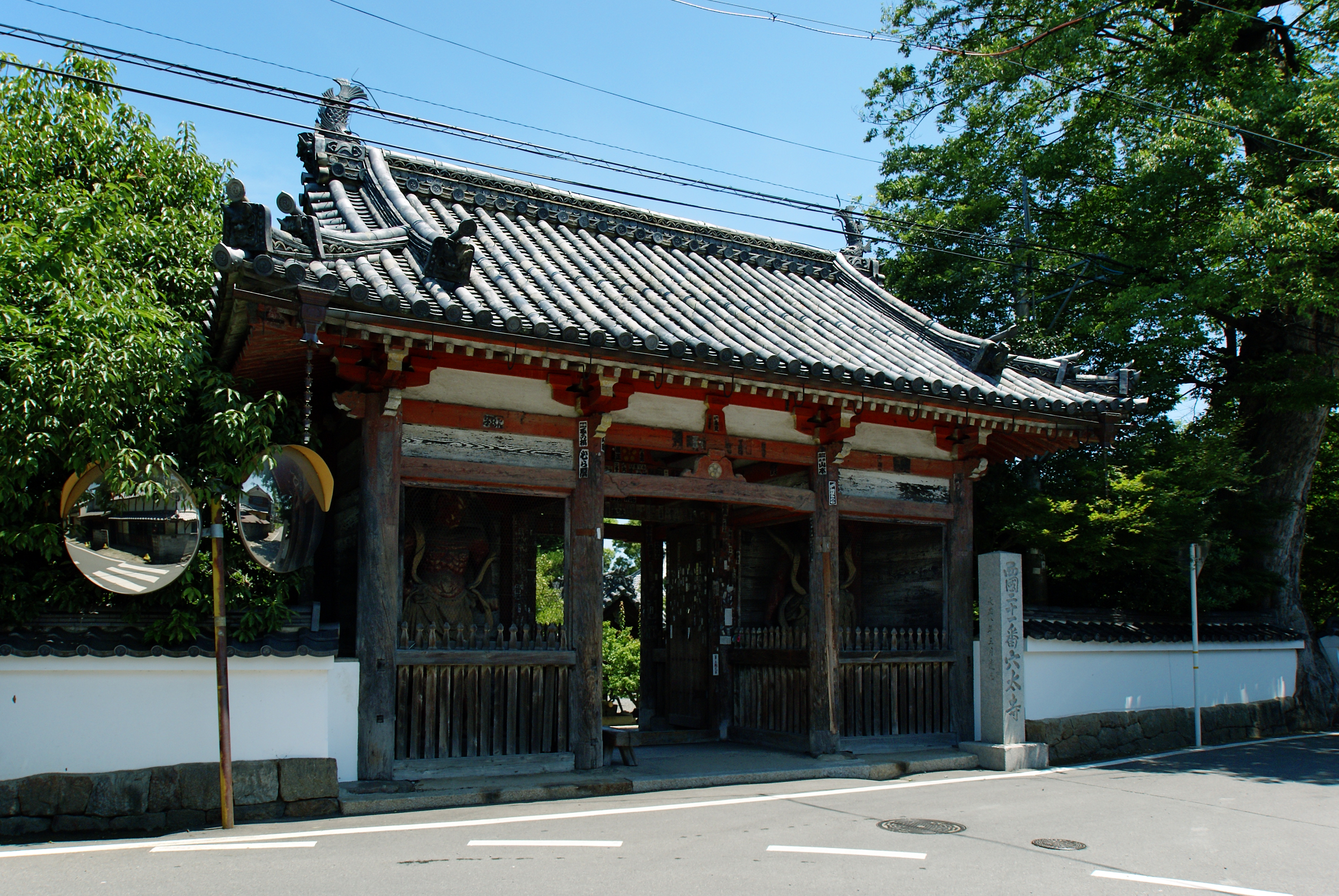 Anaoji in Kameoka, Kyoto prefecture, Japan